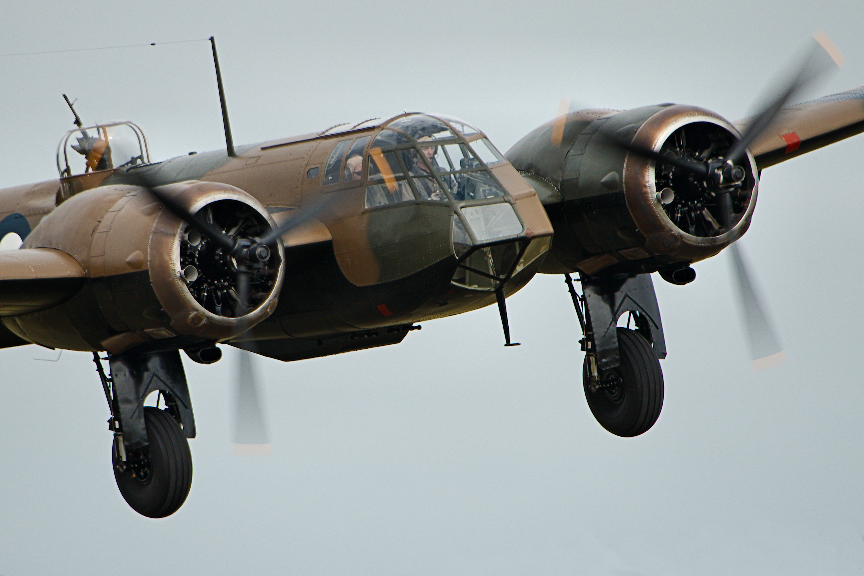 Blenheim - Flying Legends 2017